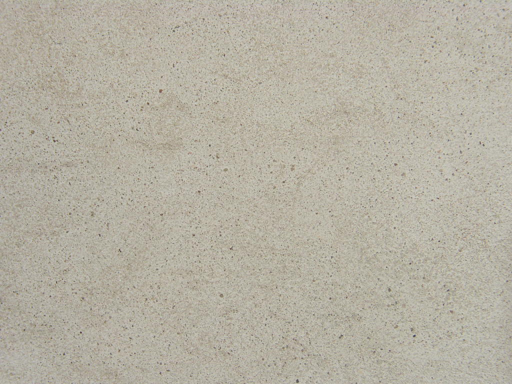 Detalle de unha parede de formigón.